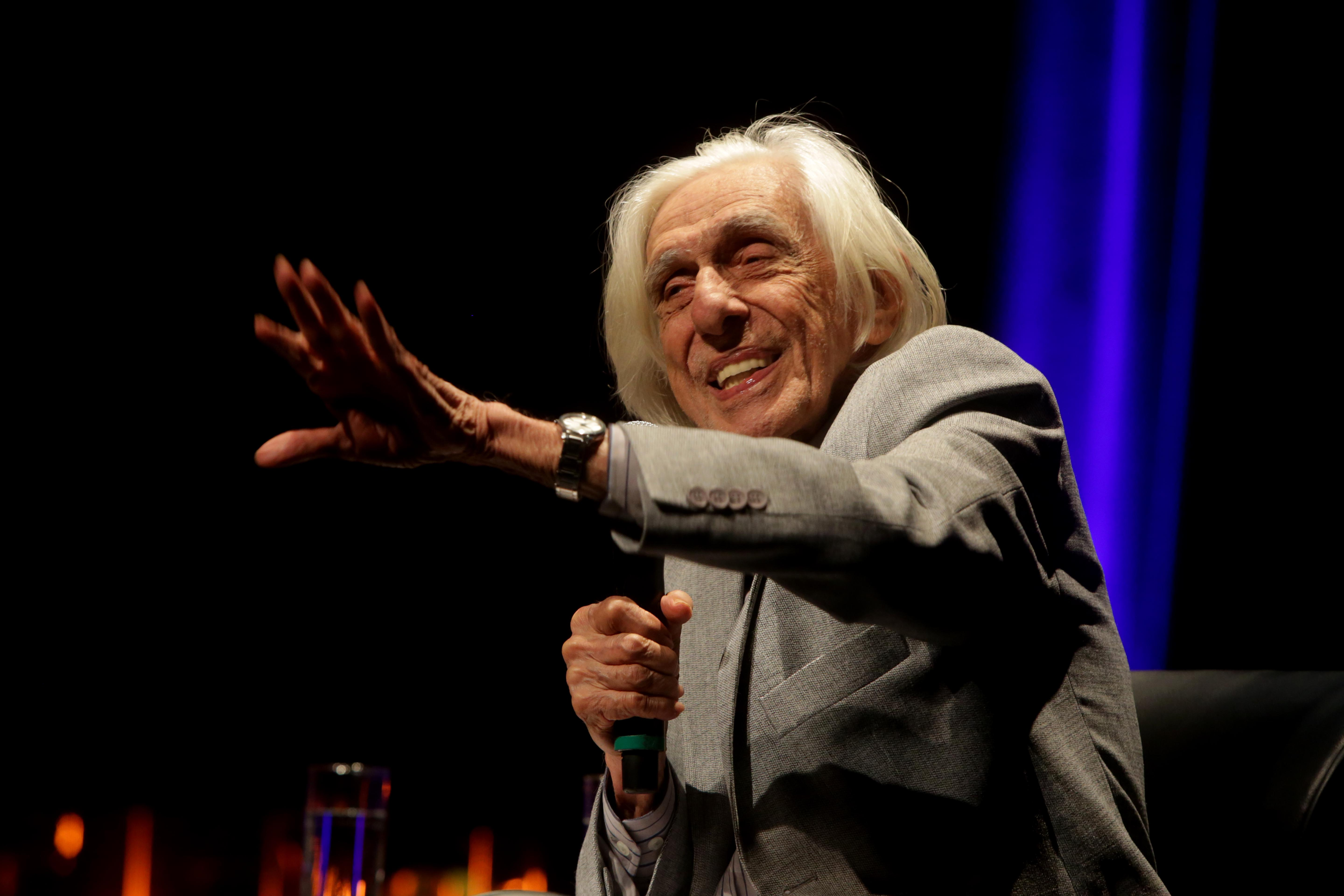 Convidado: Ferreira Gullar, poeta, crítico de arte e ensaísta brasileiro Data: 30 de setembro de 2015 Local: Teatro Cetip – São Paulo Crédito: Greg Salibian